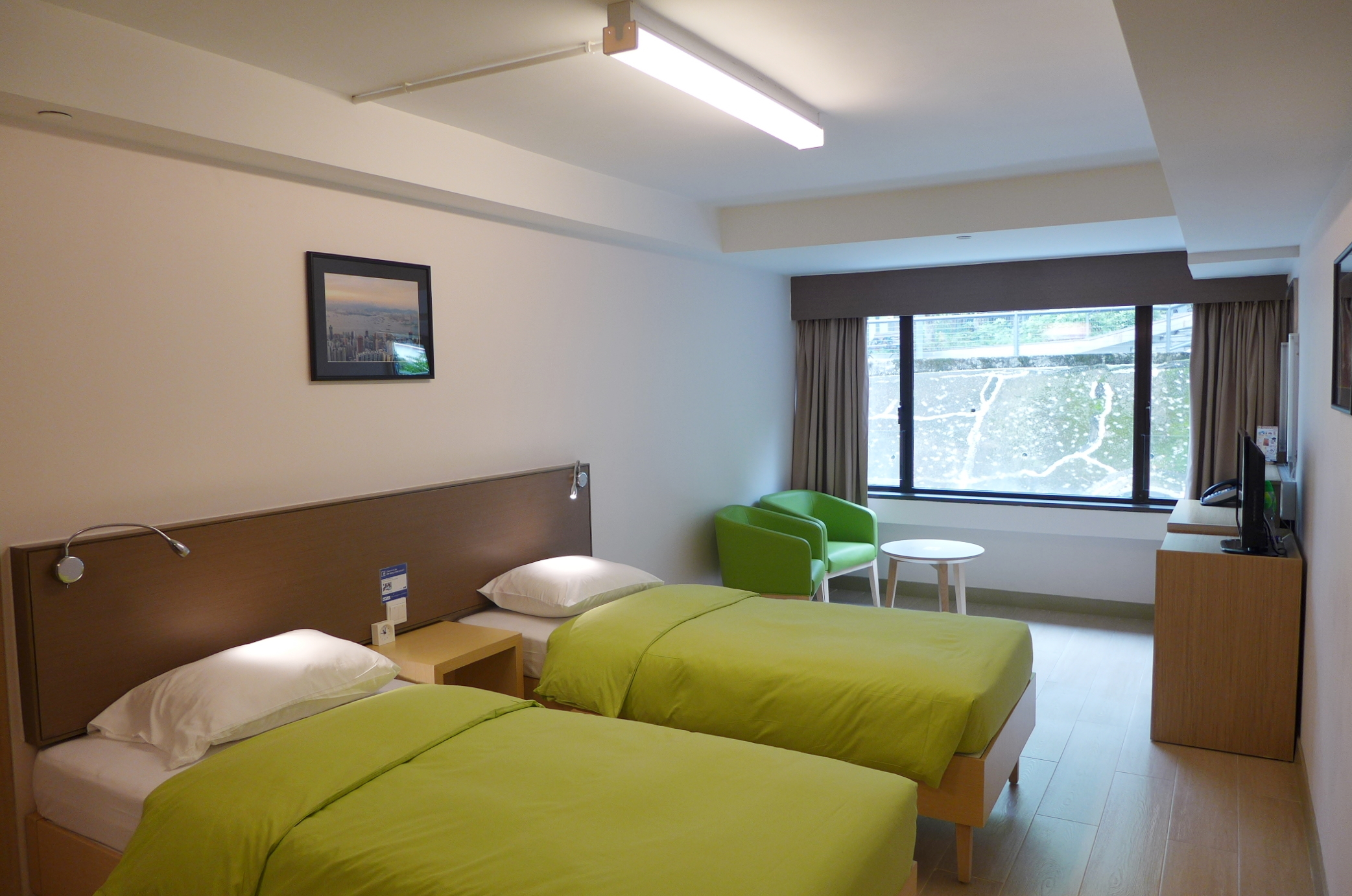 Mei Ho House Twin Bedroom